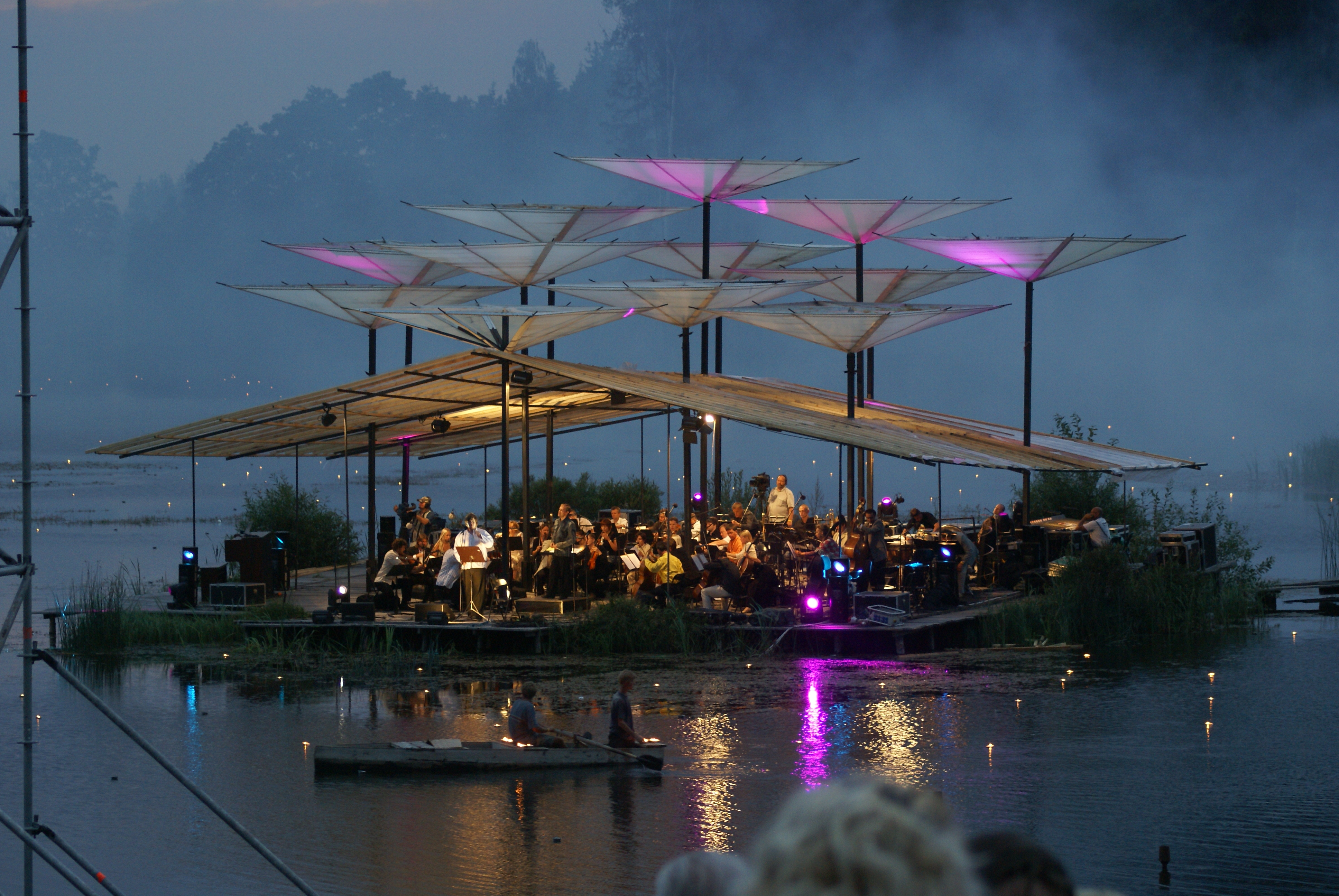 Leigo Lake Music (Leigo Järvemuusika) festival in Estonia, 2007.